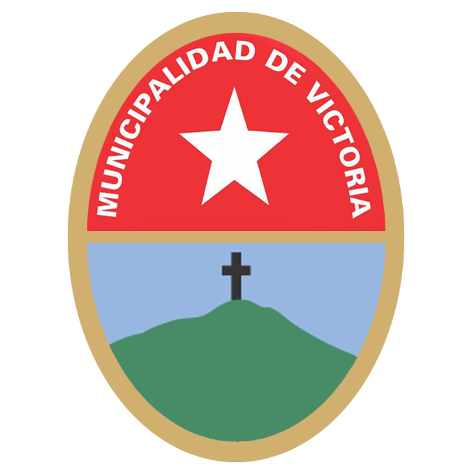 Escudo del Departamento Victoria